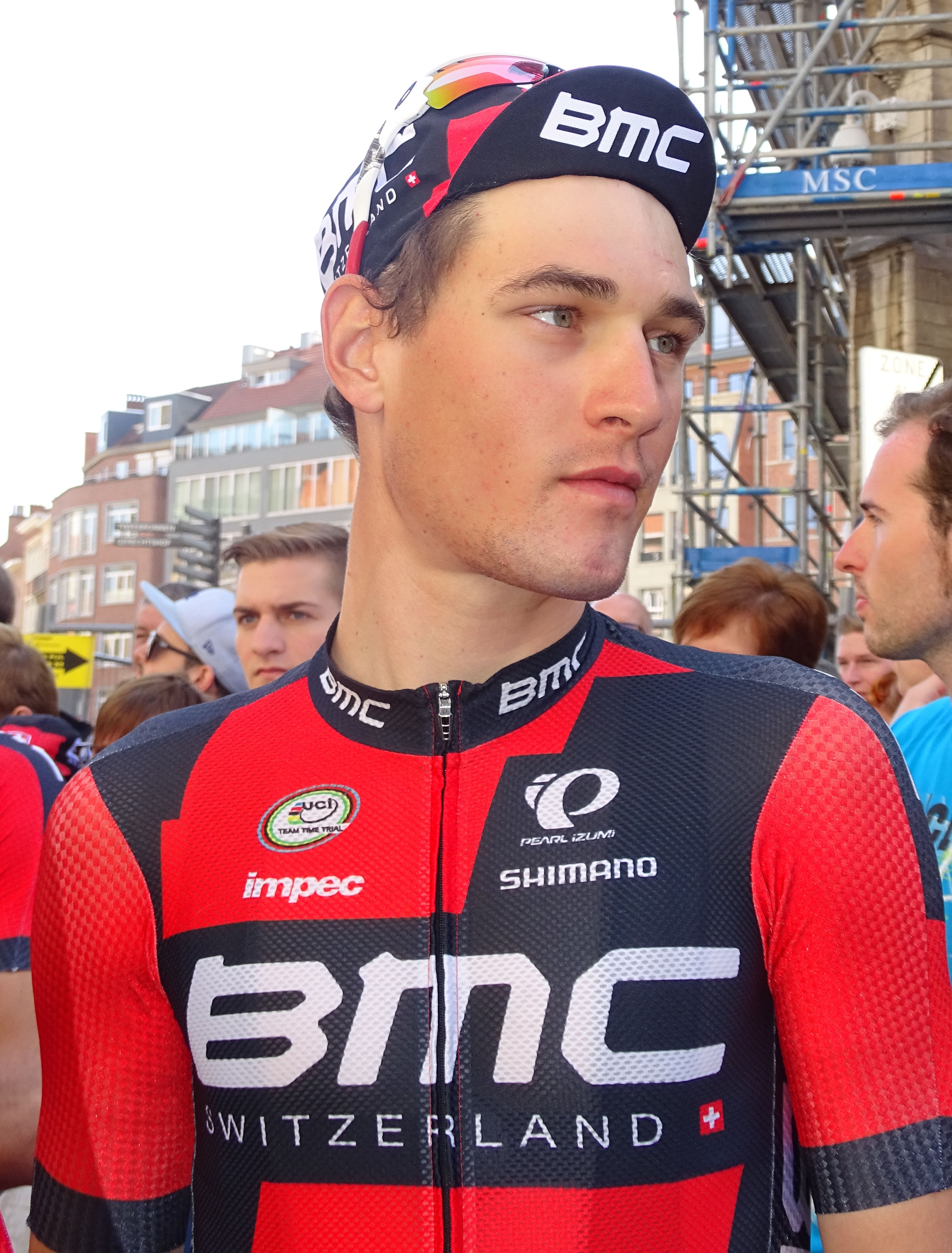 Reportage réalisé le mercredi 15 avril à l'occasion du départ de la Flèche brabançonne 2015 à Louvain, Belgique.